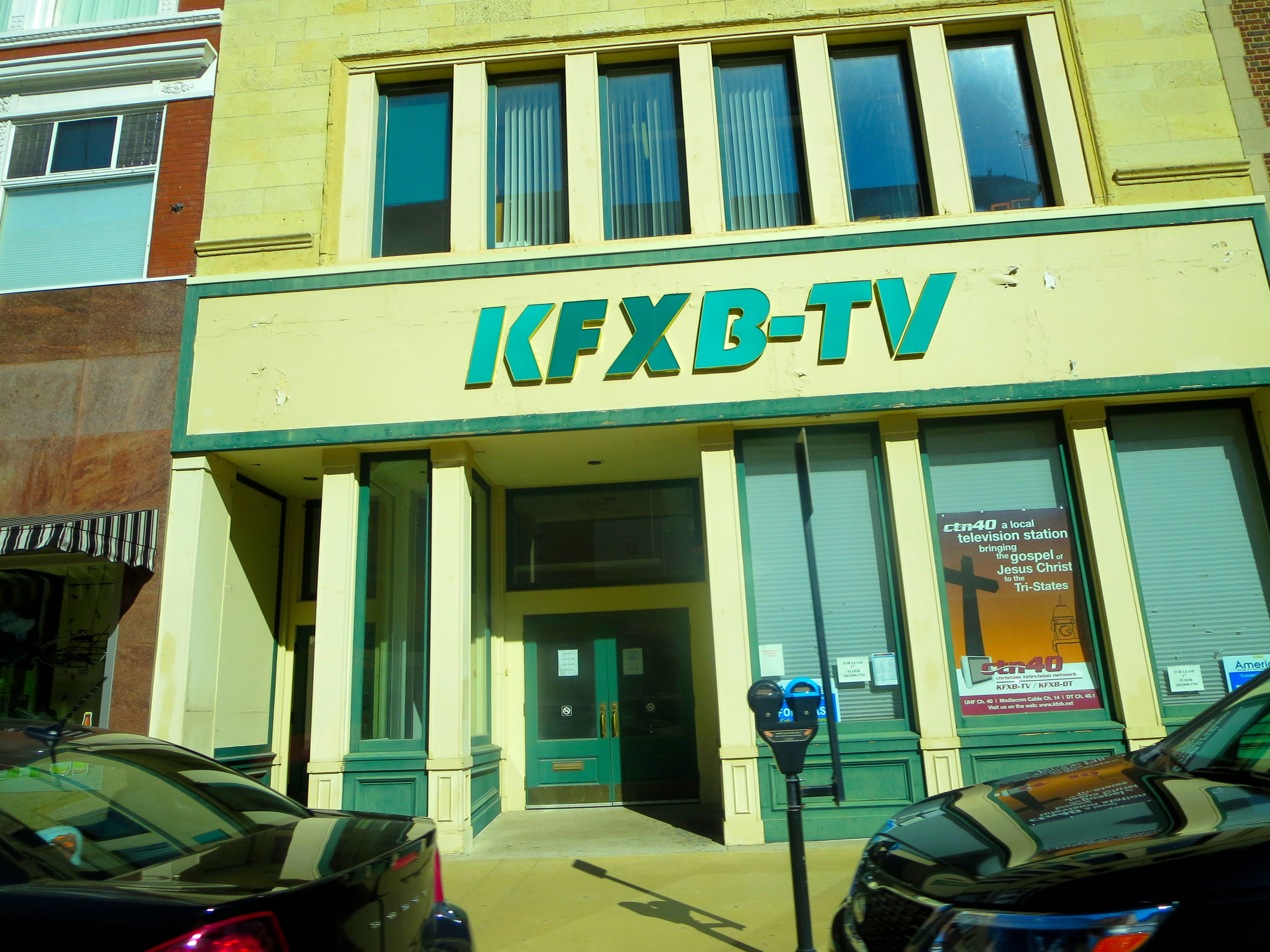 KFXB-TV Television Studio